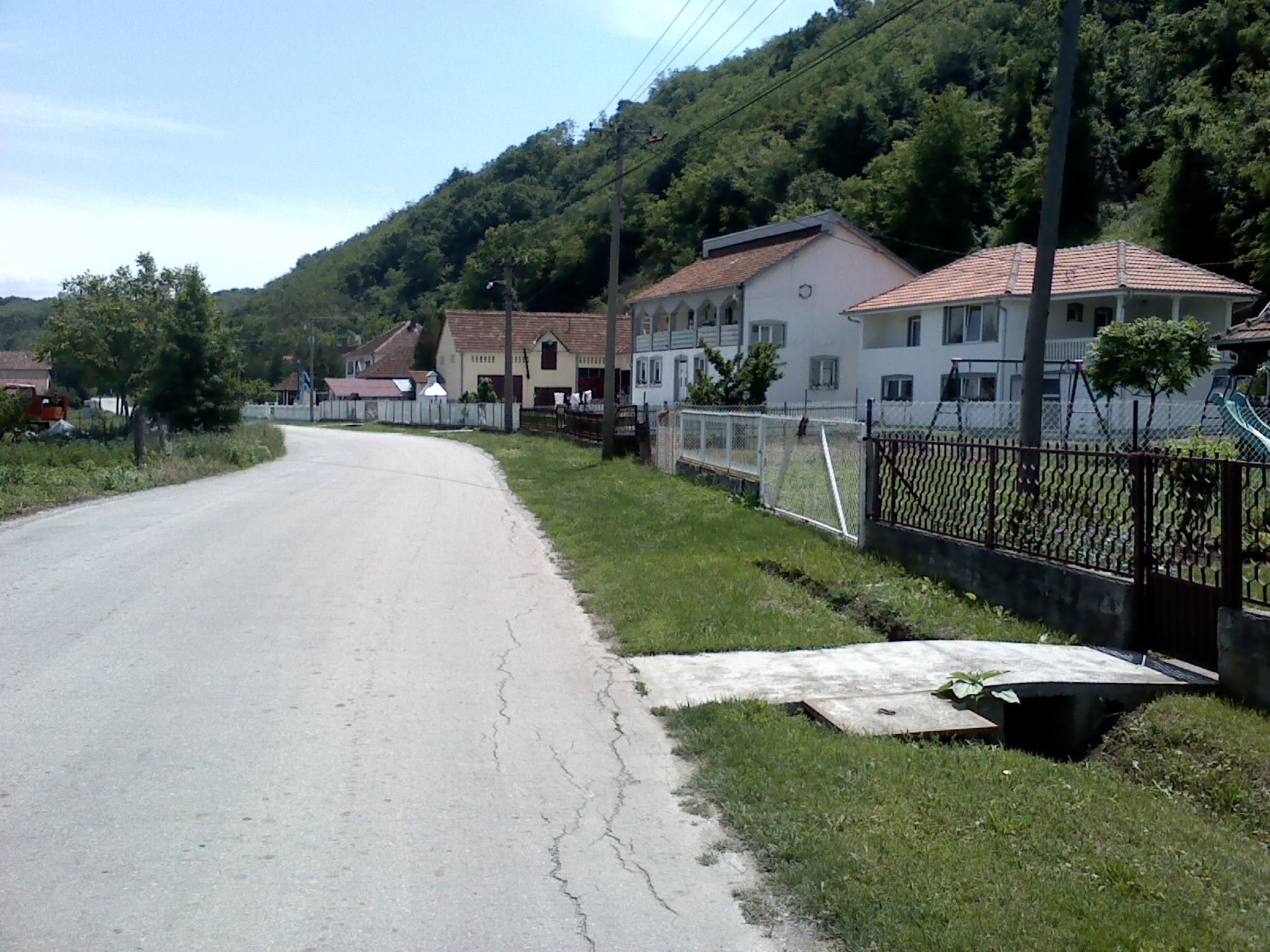 Pogled na jedan deo Gornje Batočine